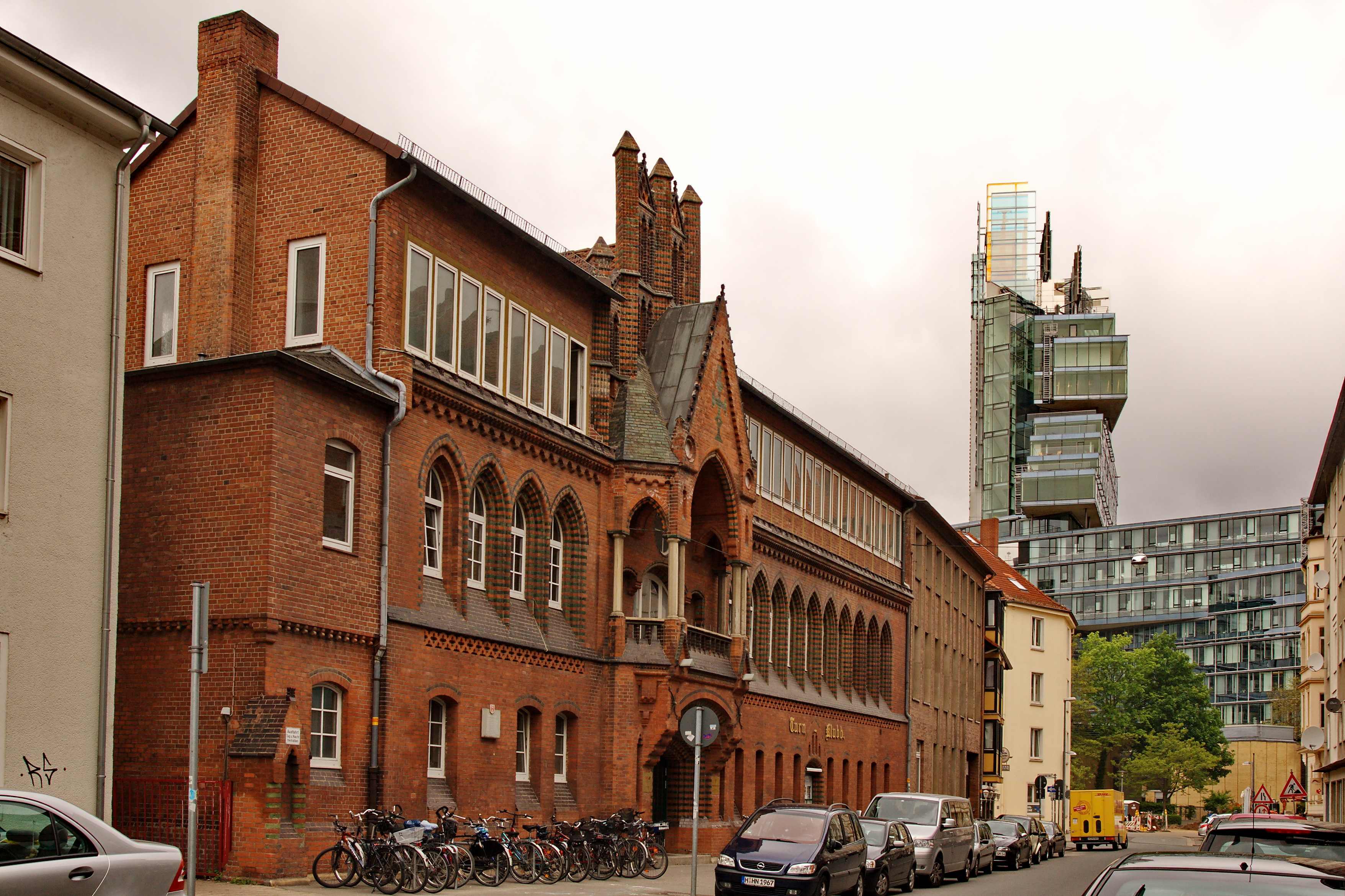 Baudenkmal Maschstraße 16 (Turnhalle) in der Südstadt (Hannover), Niedersachsen, Deutschland